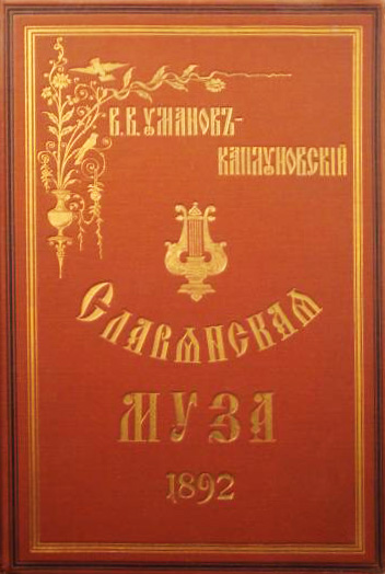 Славянская муза - сборник Уманова-Каплуновского